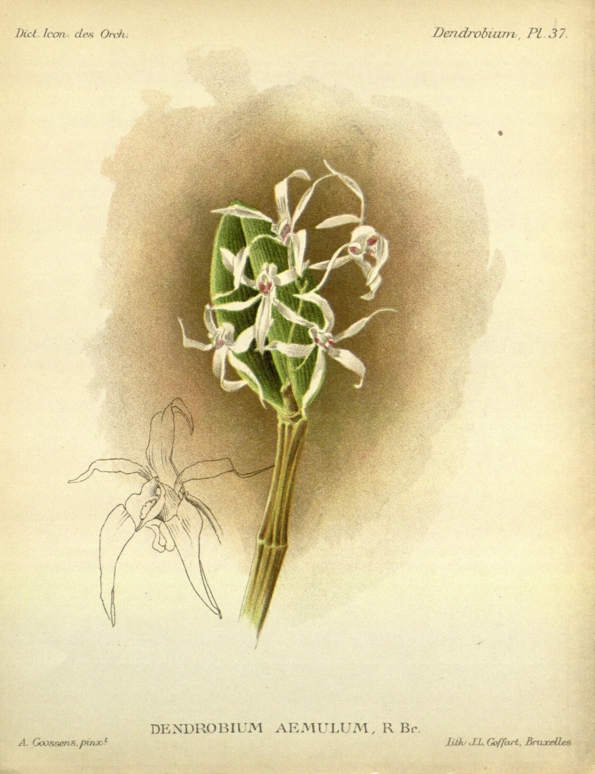 Dictionnaire iconographique des orchidees :. Bruxelles :Imp. F. Havermans, 1896-1907..